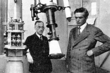 Alypio Leme and Leo Cap in SP, Brazil.